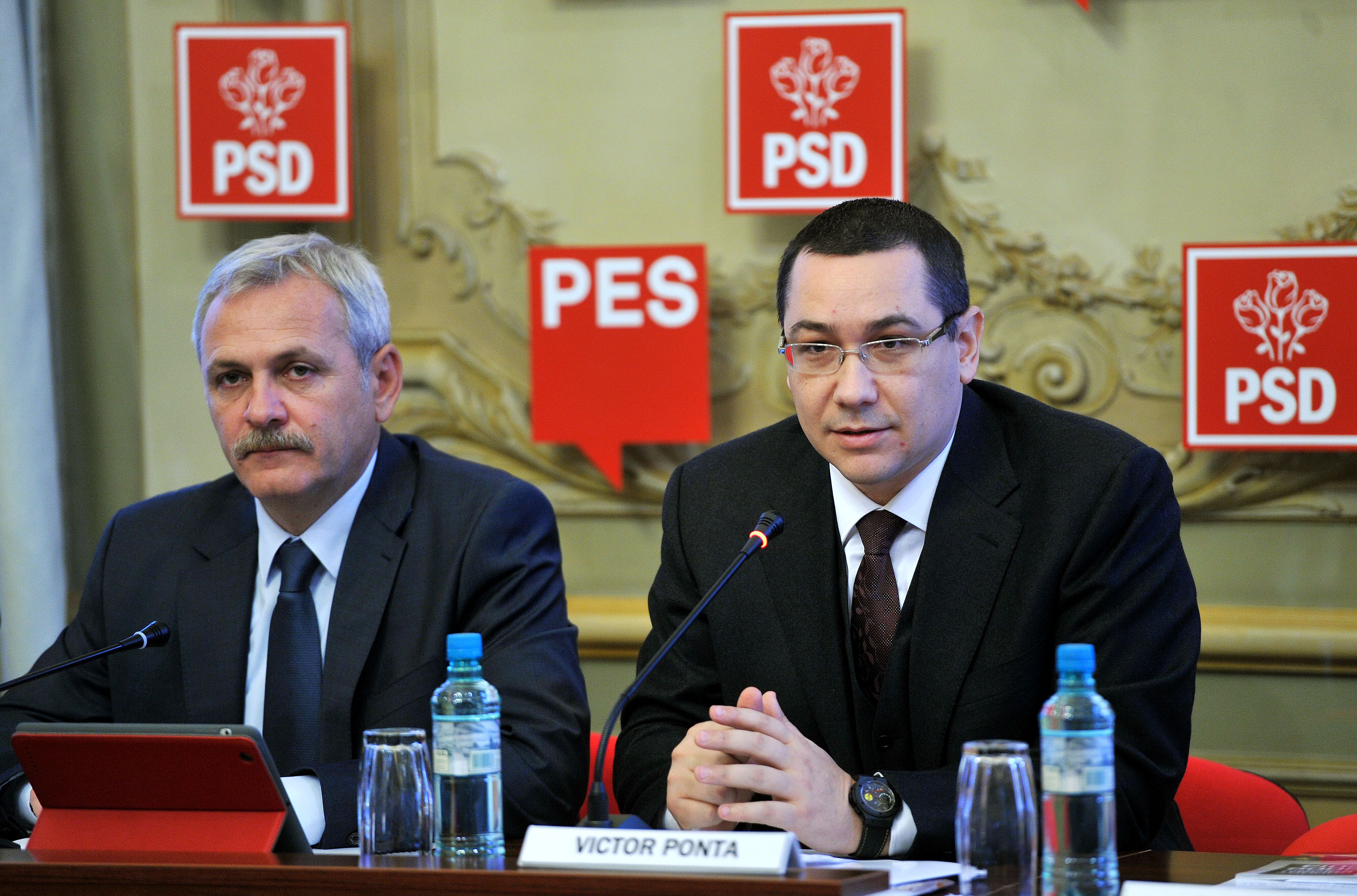 Liviu Dragnea si Victor Ponta la reuniunea BPN al PSD - 20.01.2014